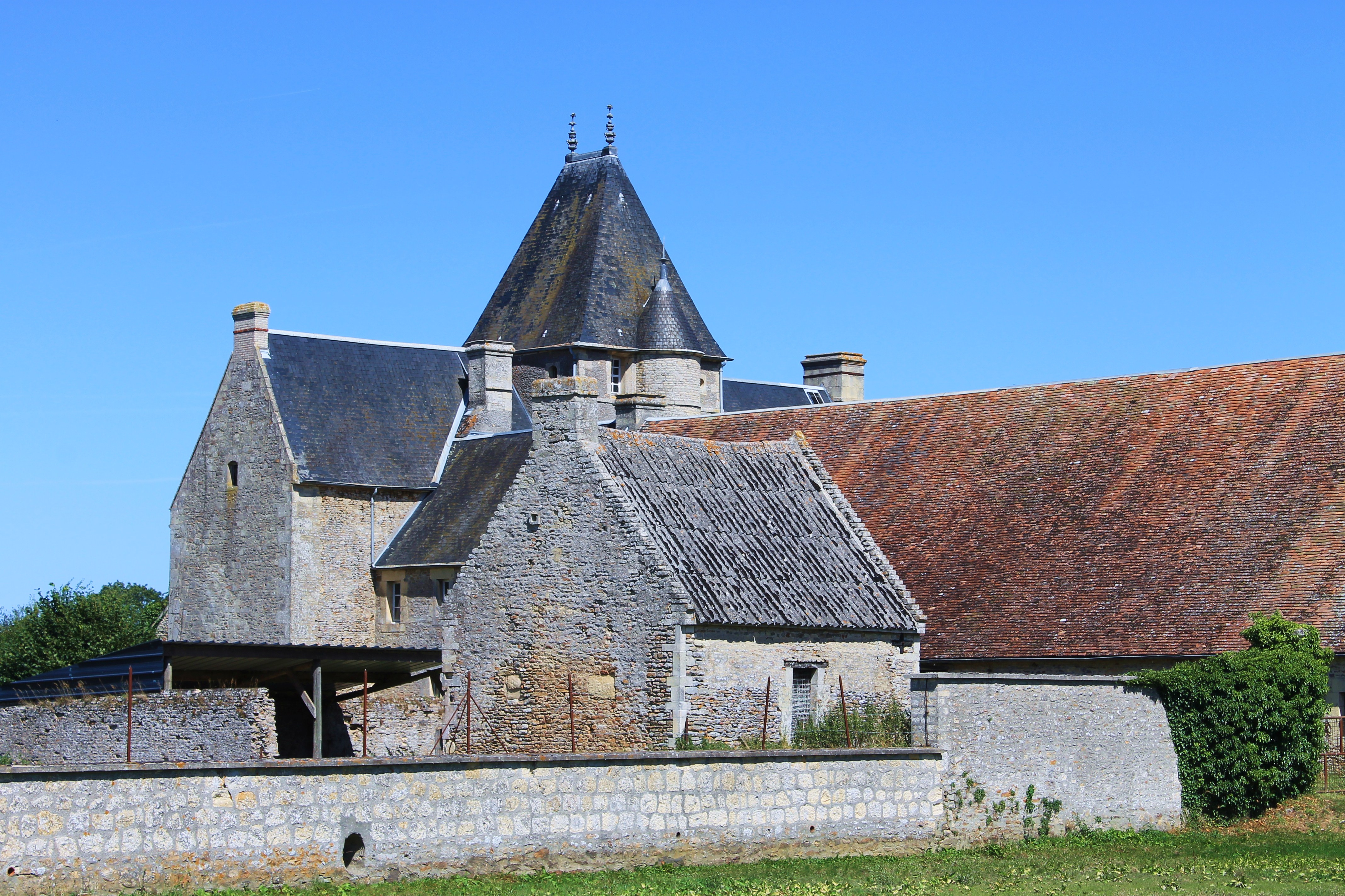 Chateau Cramesnil rue des Perrées à Saint-Aignan-de-Cramesnil (Calvados)